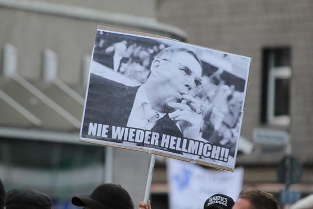 MSV Lizenzentzug 2013. Fan-Marsch mit kanpp 6000 Teilnehmern am 4. Juni 2013. Hier: Eines der Zielobjekte des Protestes